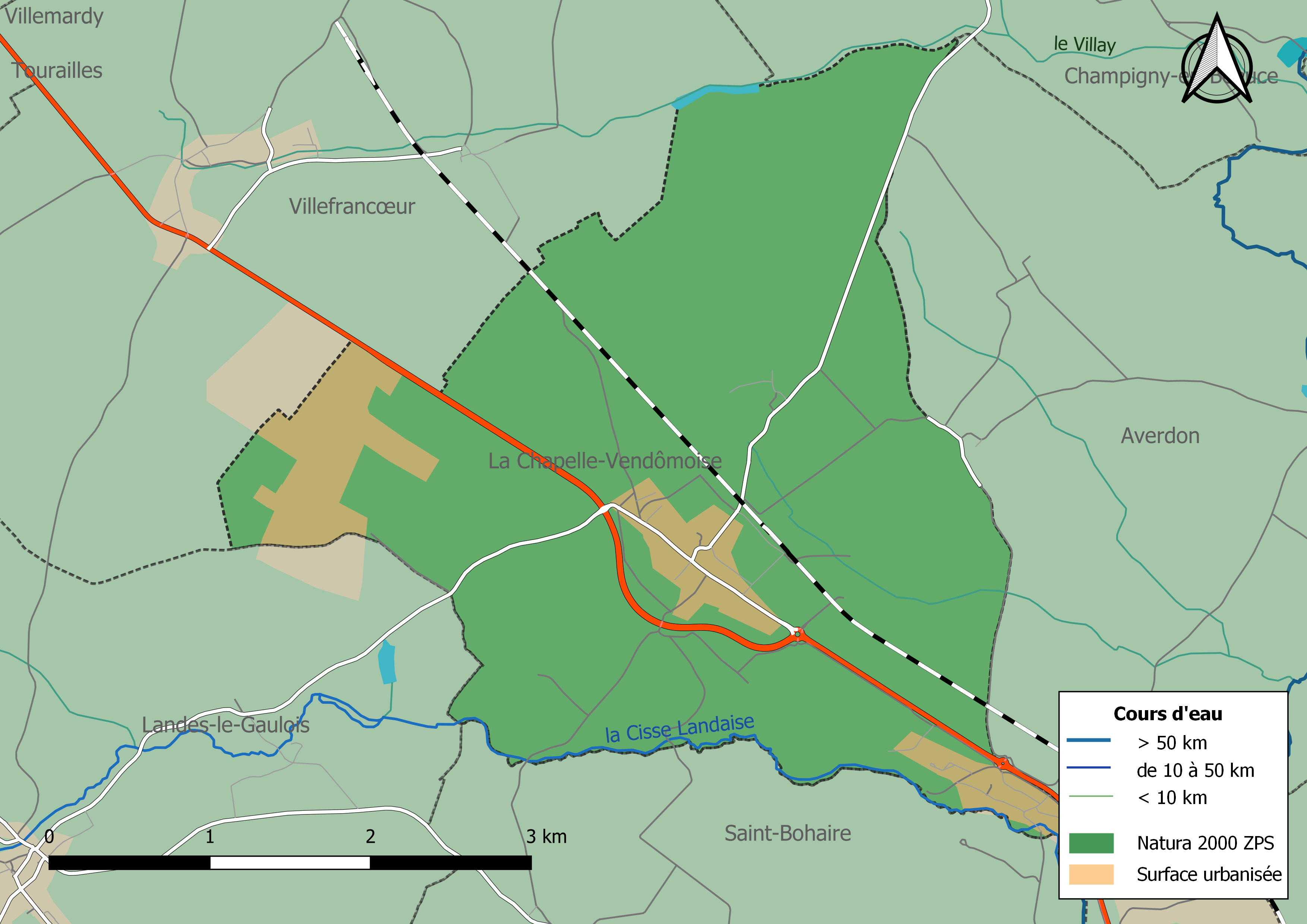 Carte des zones Natura 2000 de type ZPS de la commune de La Chapelle-Vendômoise. (Loir-et-Cher, France).